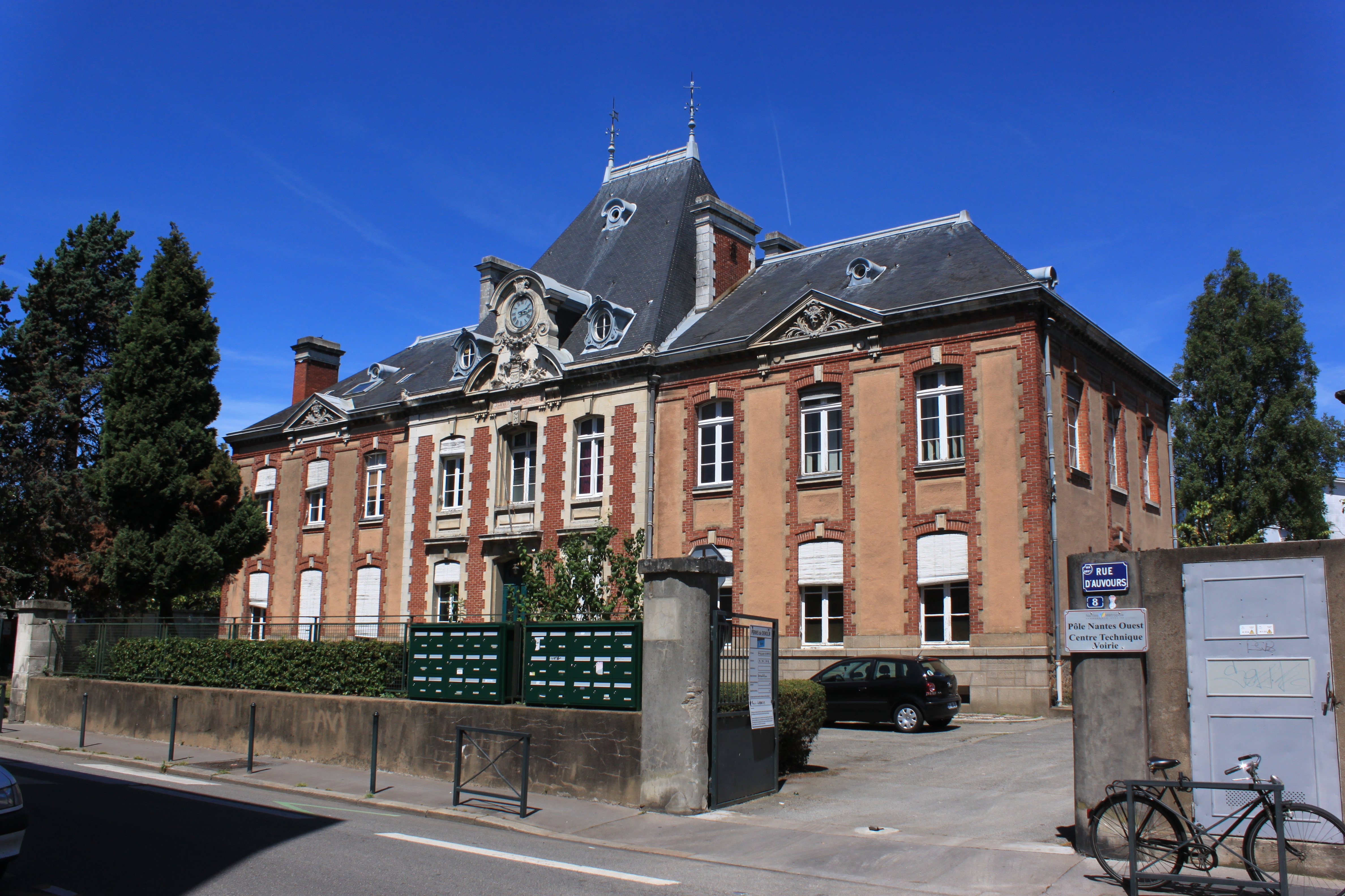 Bâtiment du Service des eaux, rue d'Auvours, Fr-44-Nantes.